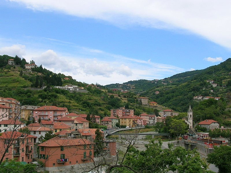 autore f.noceti